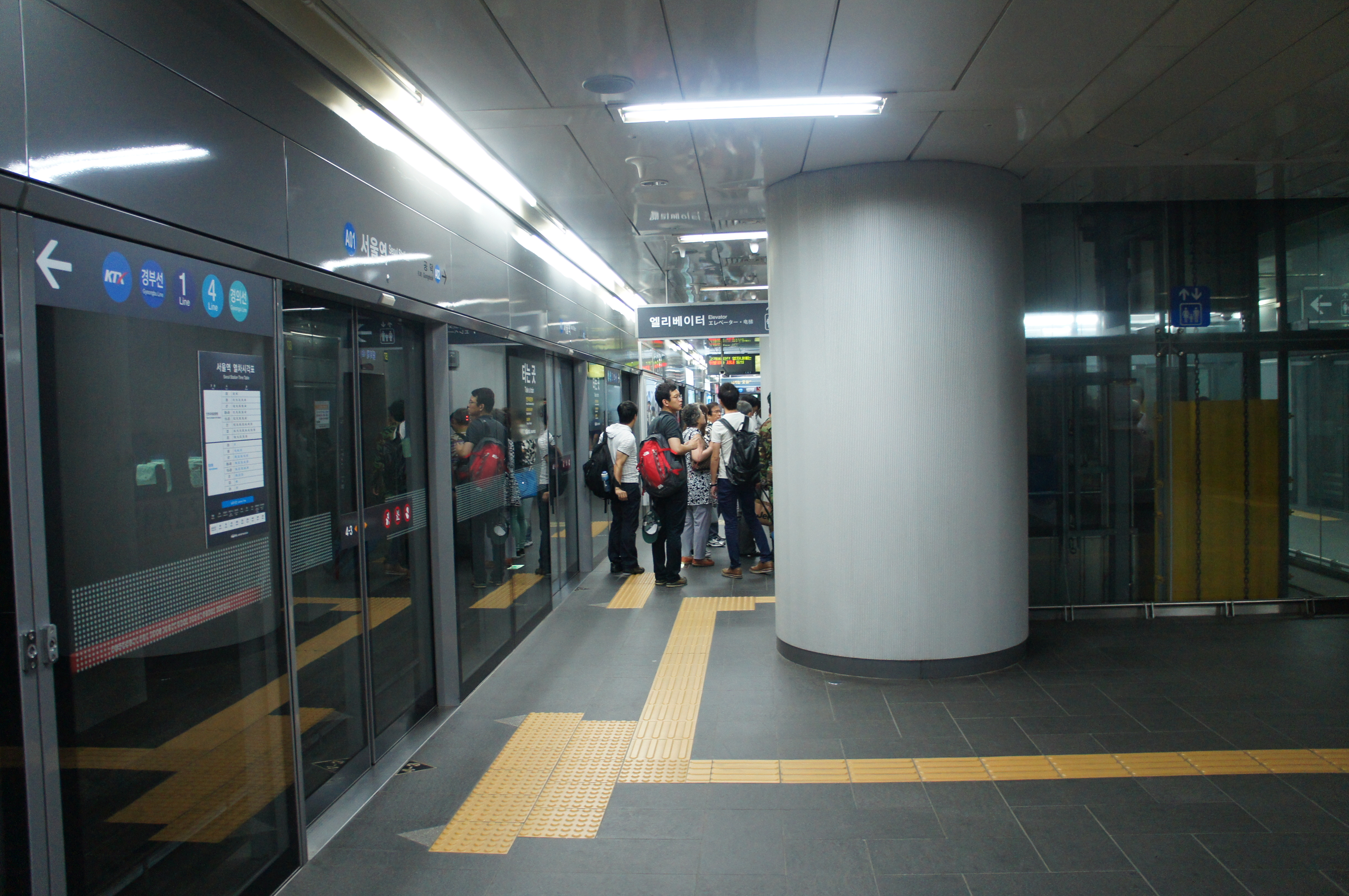 서울역 공항철도 승강장